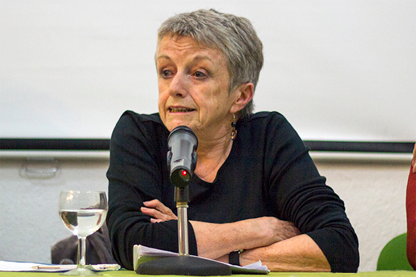 Doreen Massey en una conferencia en Madrid, junio de 2012.